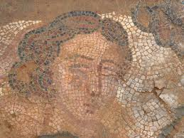 Villa Romana Orpheus de Camarzana de Tera